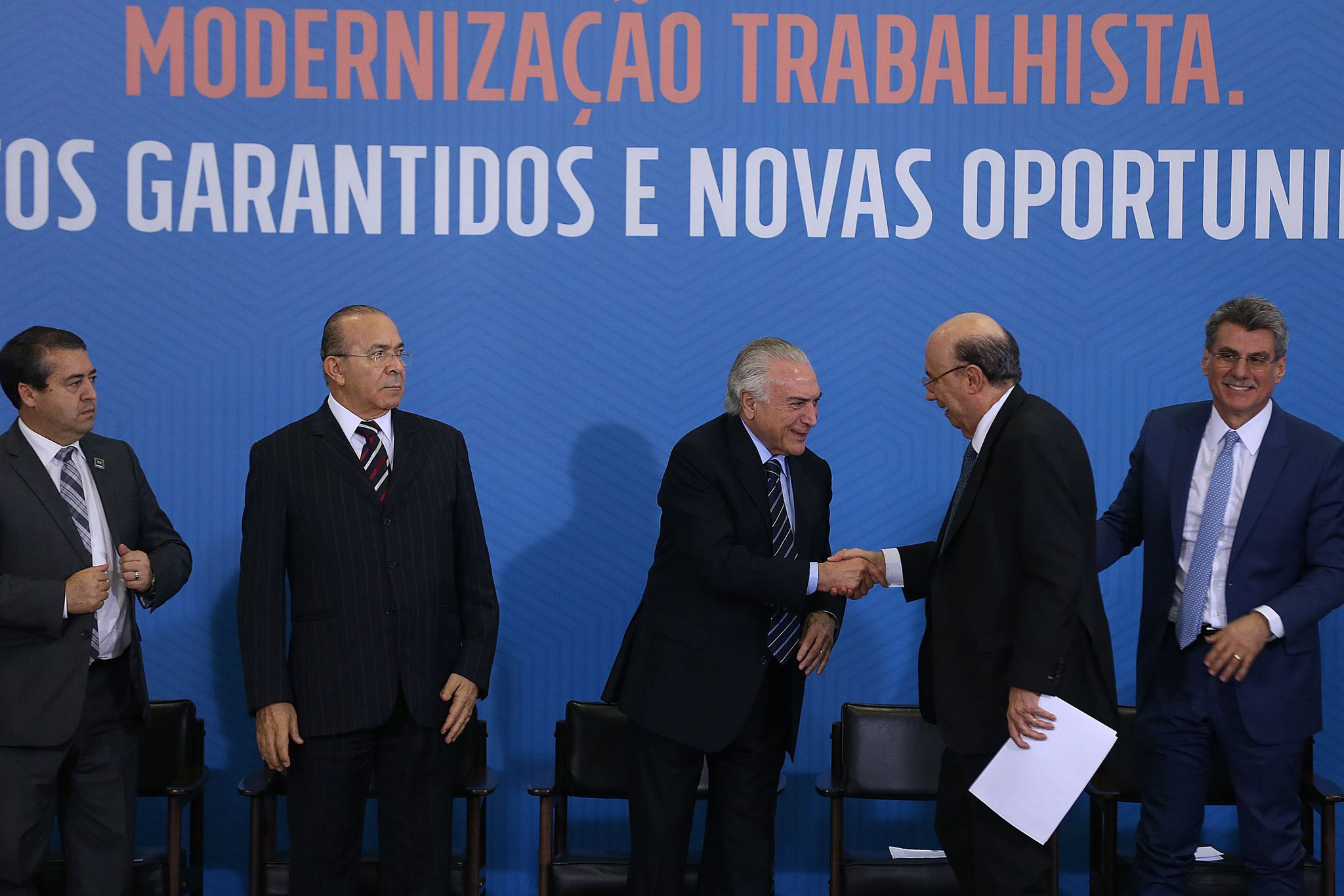 Brasilia - O presidente Michel Temer, junto a ministros e parlamentares, fazem pronunciamento após a sanção da reforma trabalhista